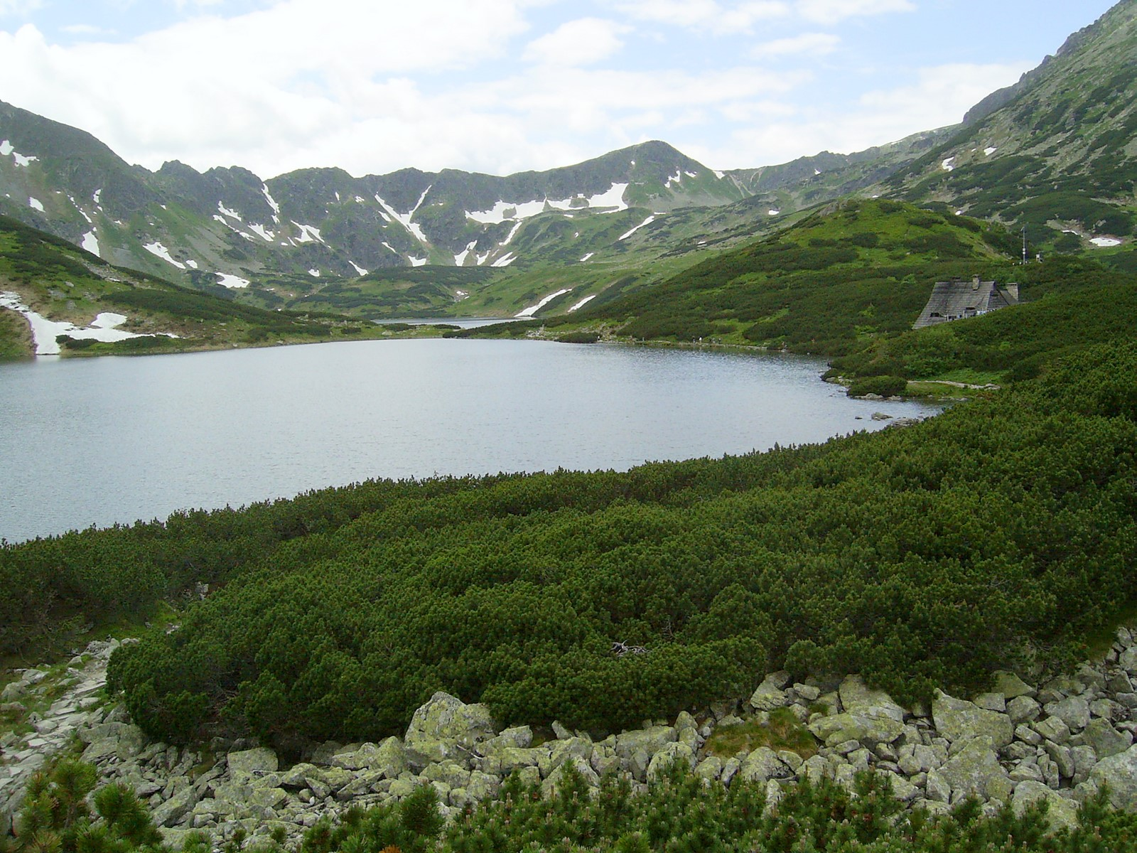 Widok na Przedni Staw Polski ze szlaku przez Świstówkę Roztocką